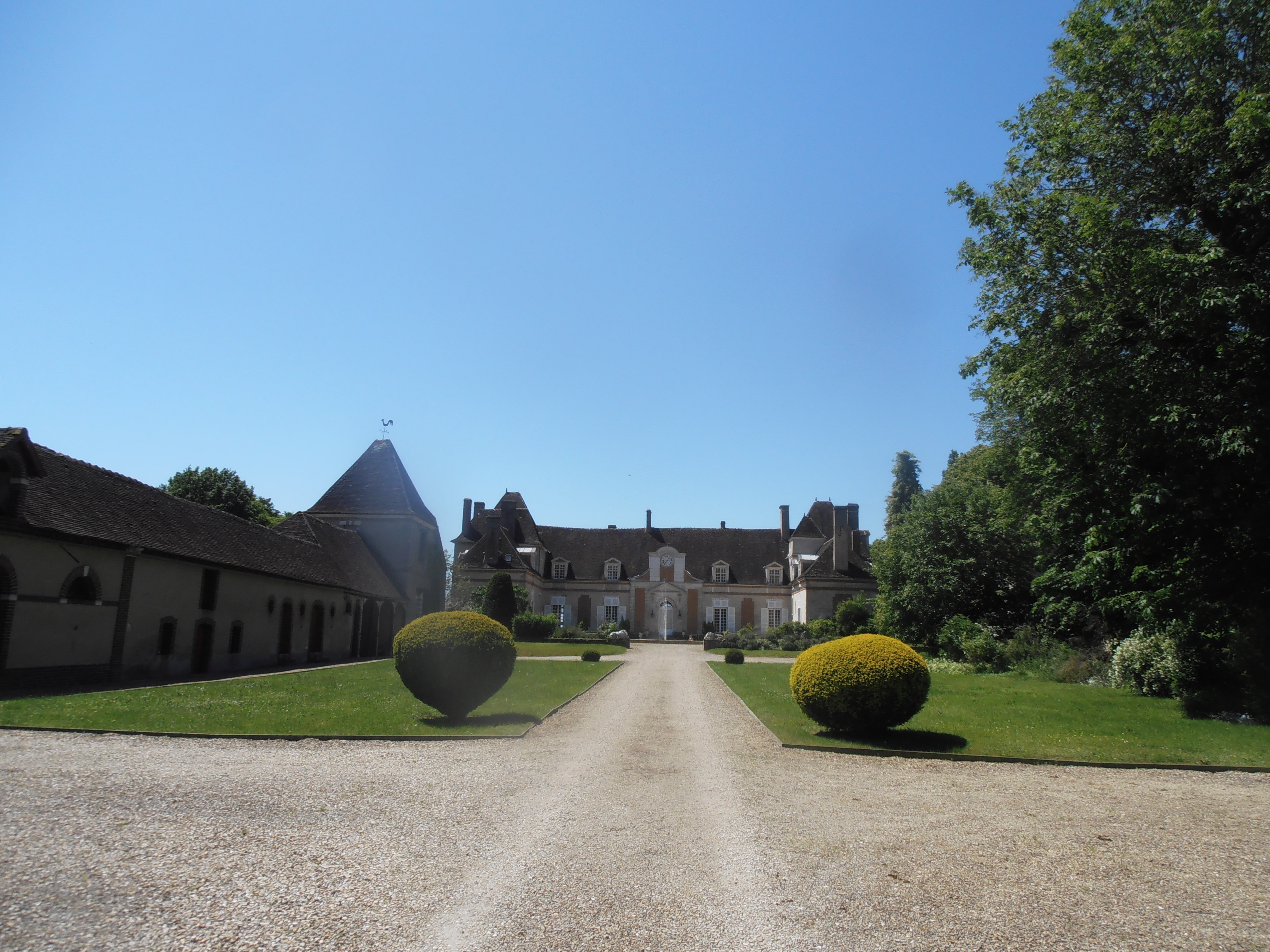 Chateau du Fey de Villecien (Yonne) France (coté parc) construit par Nicolas de Baugy au XVIIe siècle